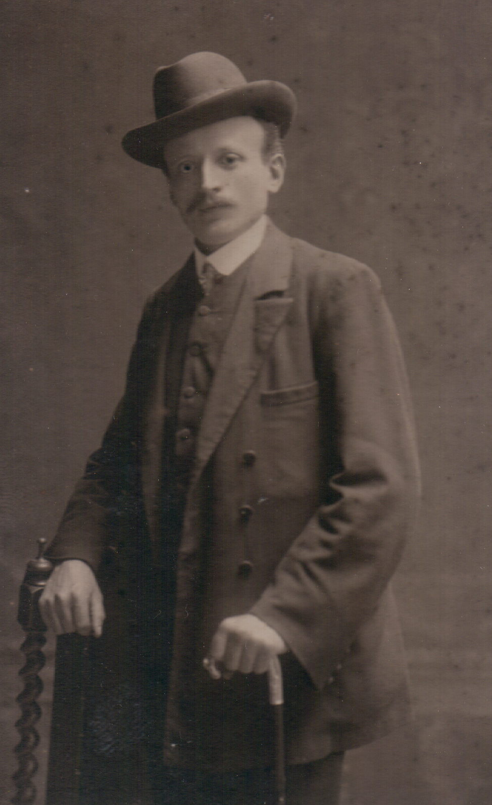 Archimede Bottazzi, orafo